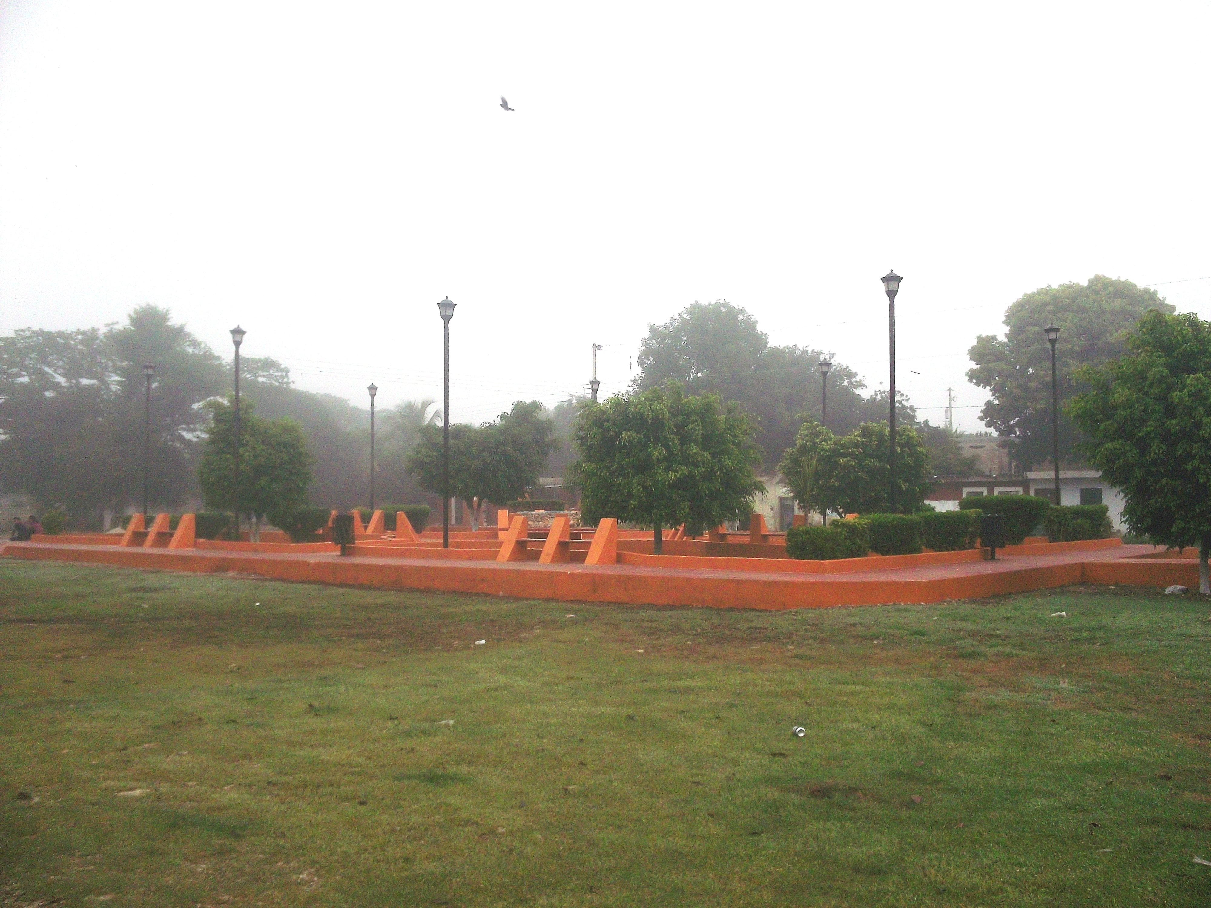 Parque principal de Xcucul Sur, Yucatán.